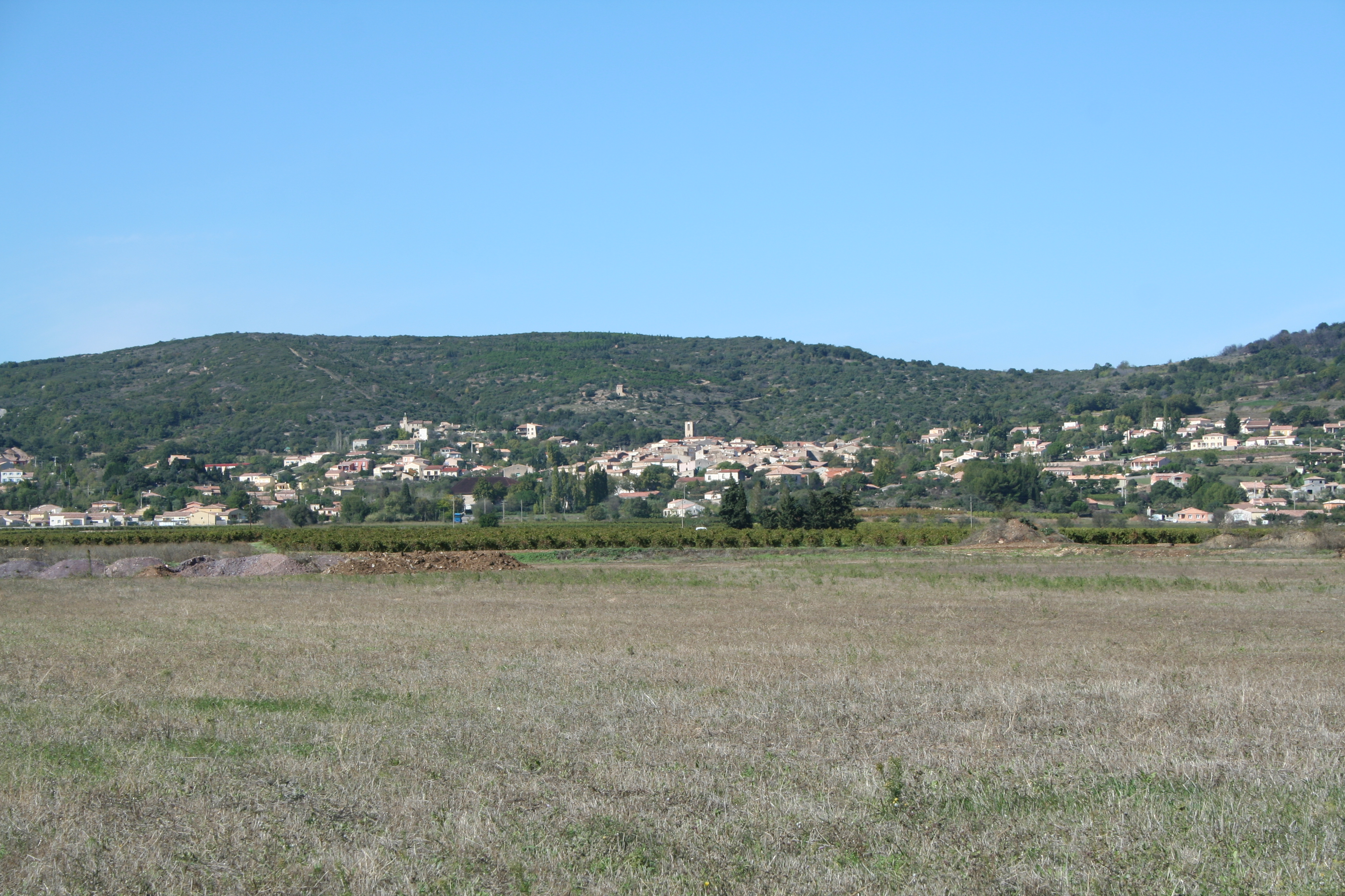 Péret (Hérault) - vue générale.